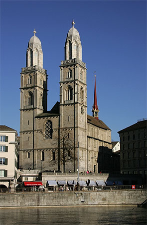 Grossmünster in Zürich